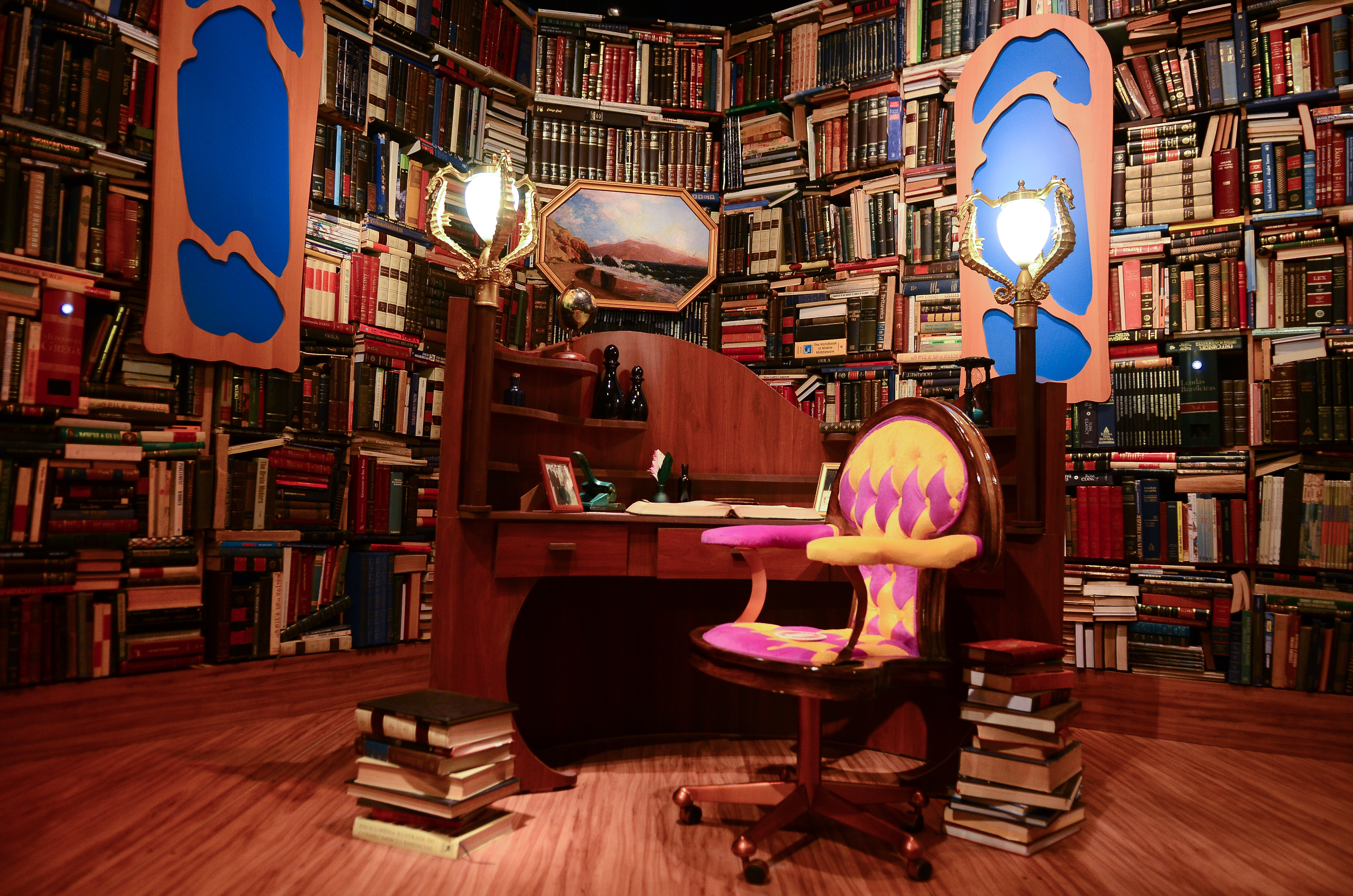 São Paulo - Memorial da América Latina, em parceria com o Governo do Estado de São Paulo, inaugura a exposição "Rá-Tim-Bum, o Castelo", que recria os cenários do seriado produzido pela TV Cultura na década de 90 (Rovena Rosa/Agência Brasil)